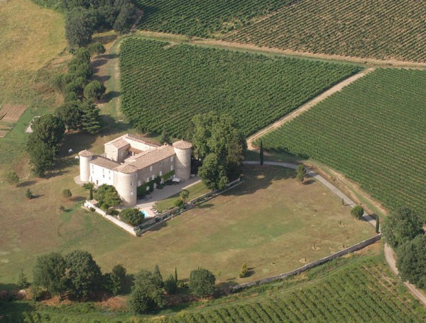 Château de la Selve